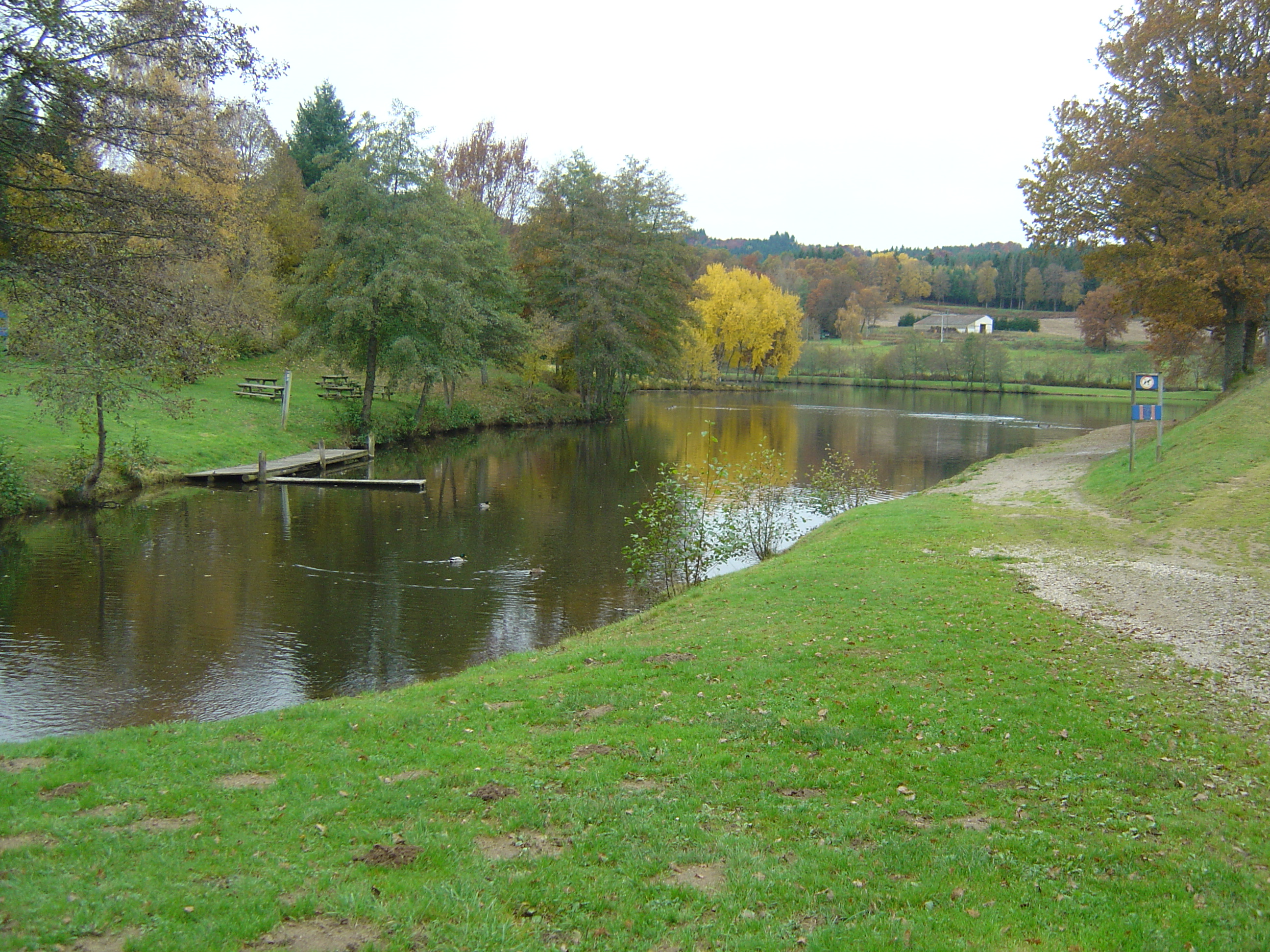 Plan d'eau de Cunlhat (Puy-de-Dôme; 63; Livradois)